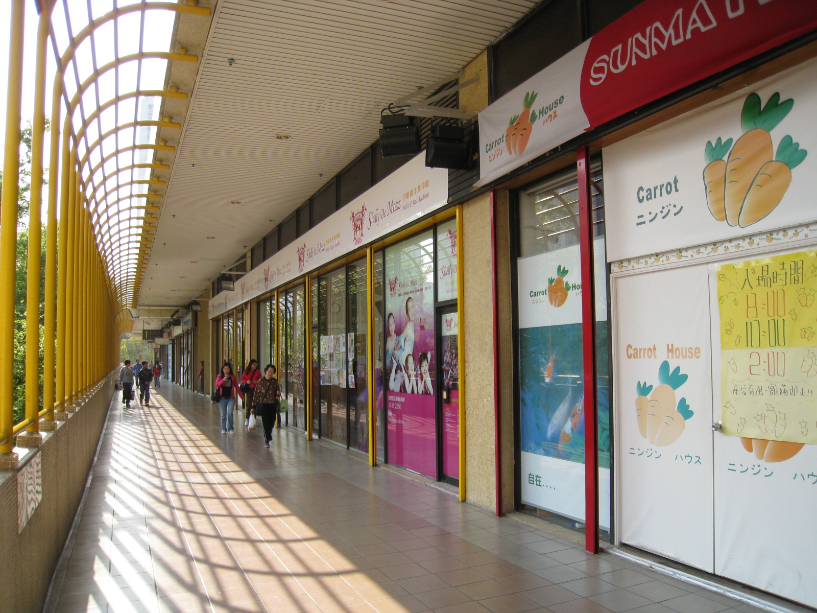 Tsing Yi Garden Shops